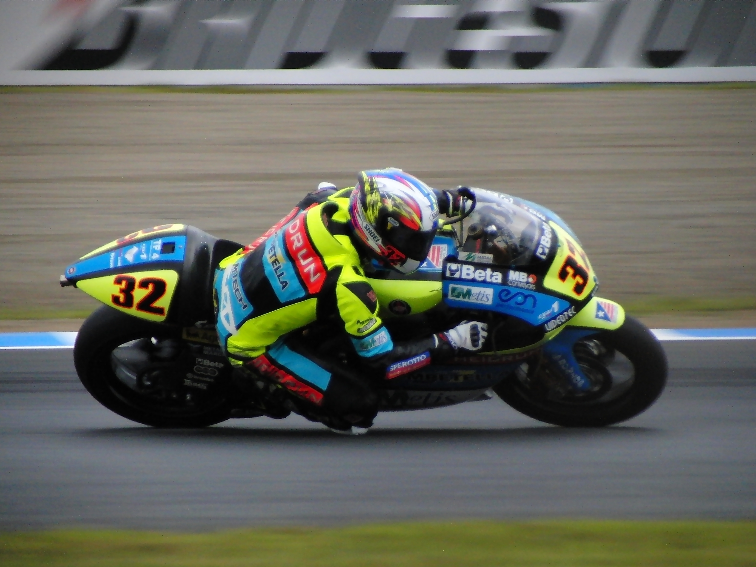 Fabrizio Lai 2008 Motegi